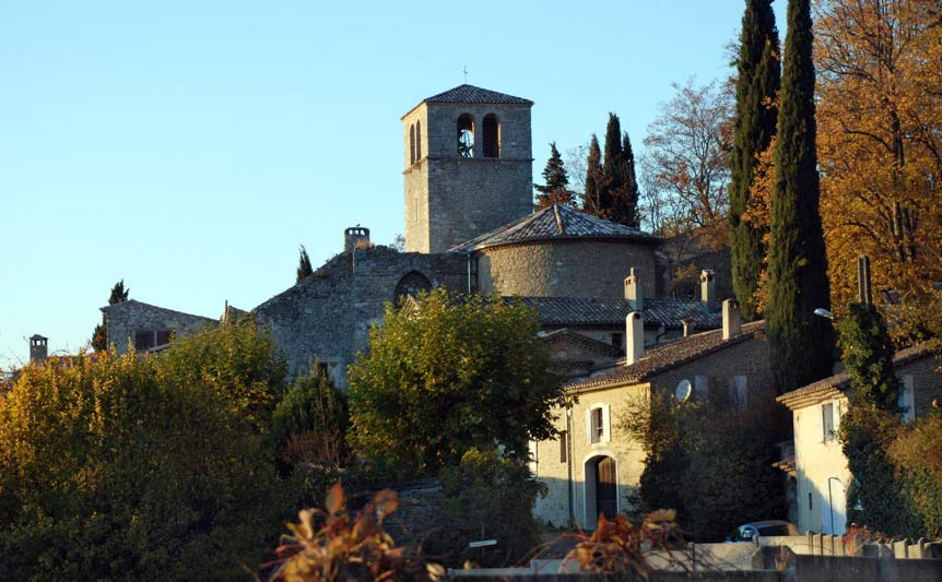 Vue de l'arrivée au Sud de Châteauneuf de Mazenc